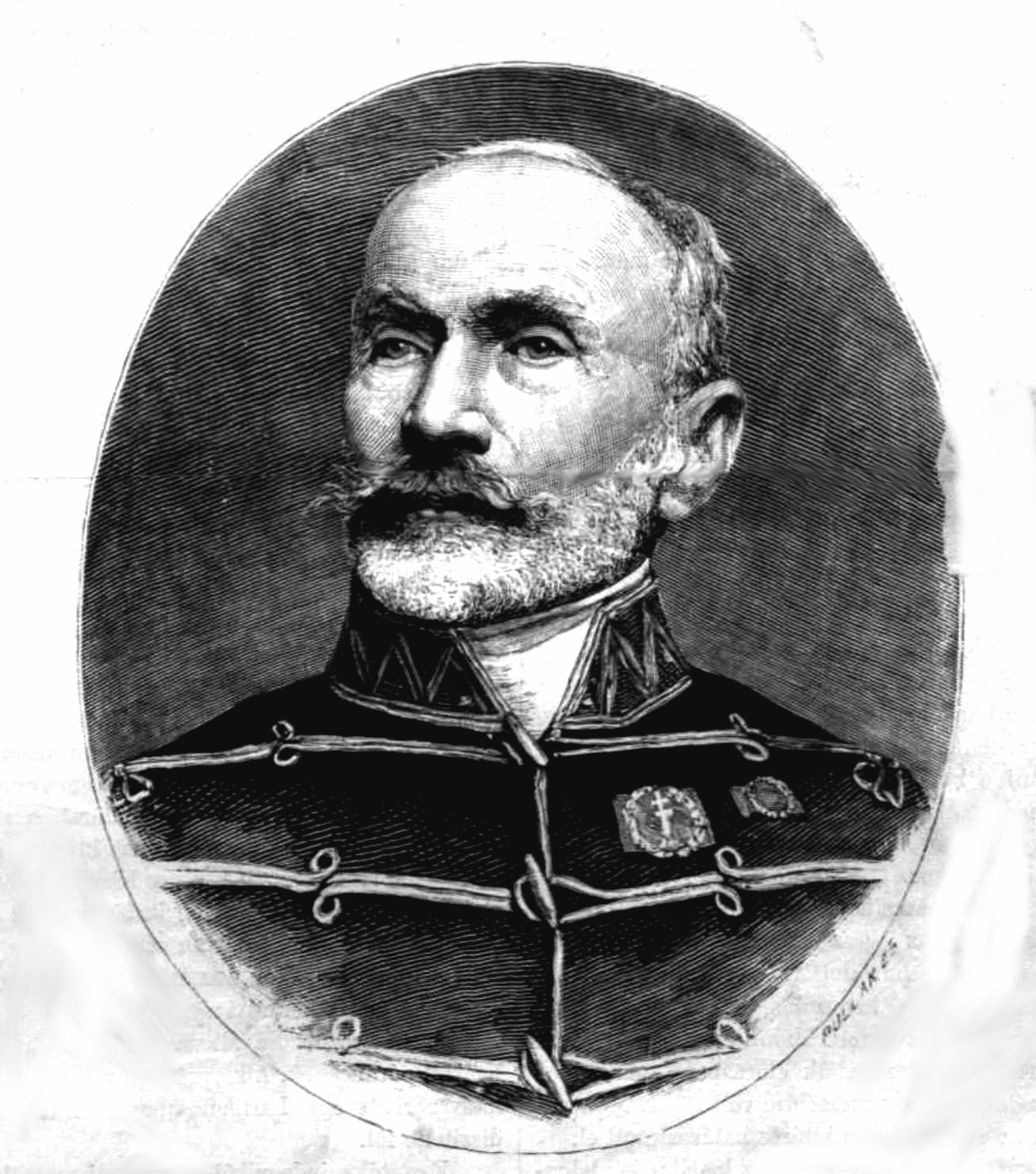 Bátori-Schulcz Bódog